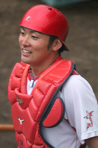 2017/11/7 天福球場